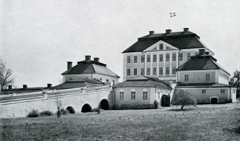 Tureholms slott, fasad mot morr på 1930-talet